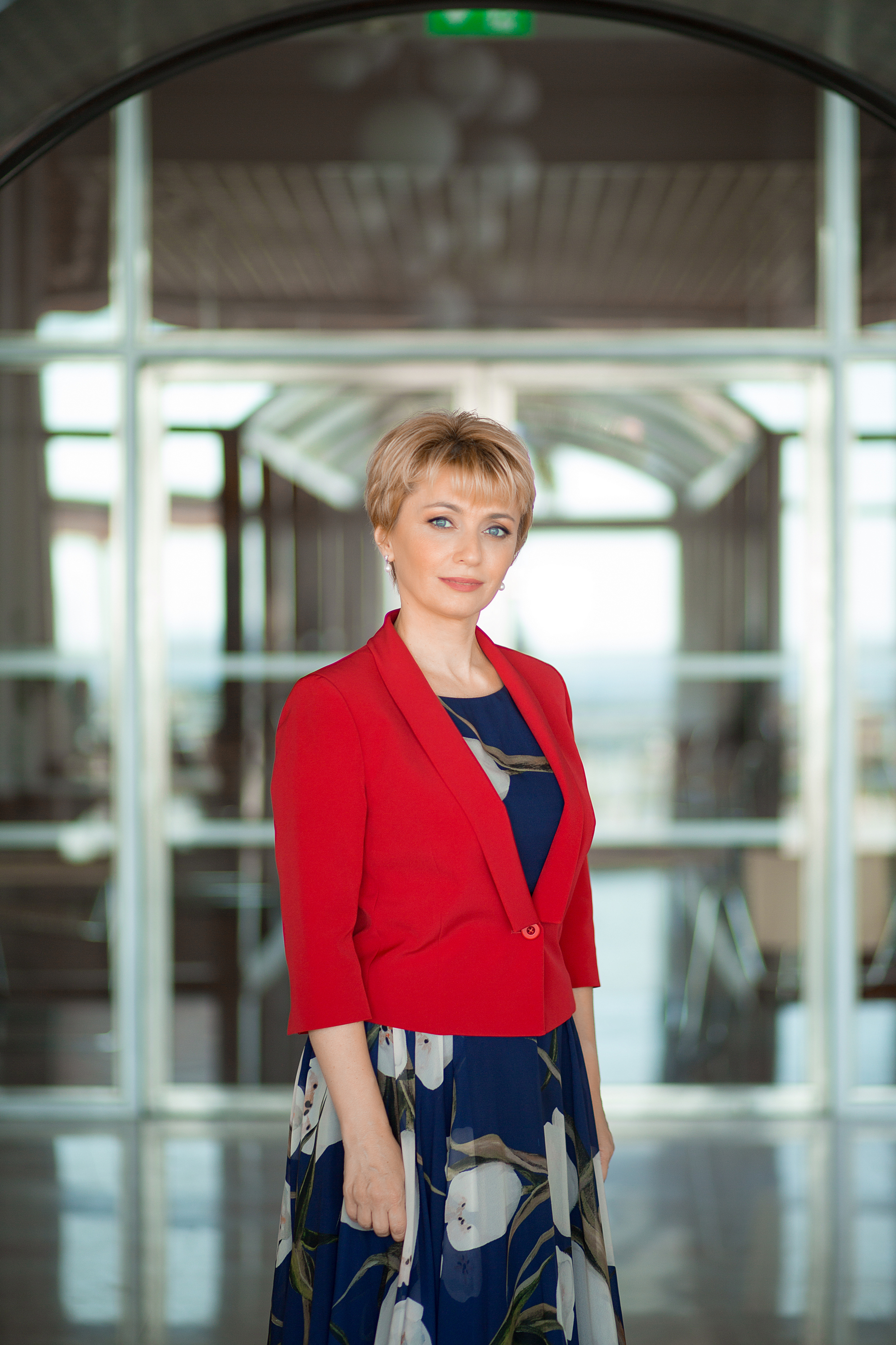 Наталия Кардаш, главный редактор газеты «Вестник Кипра»